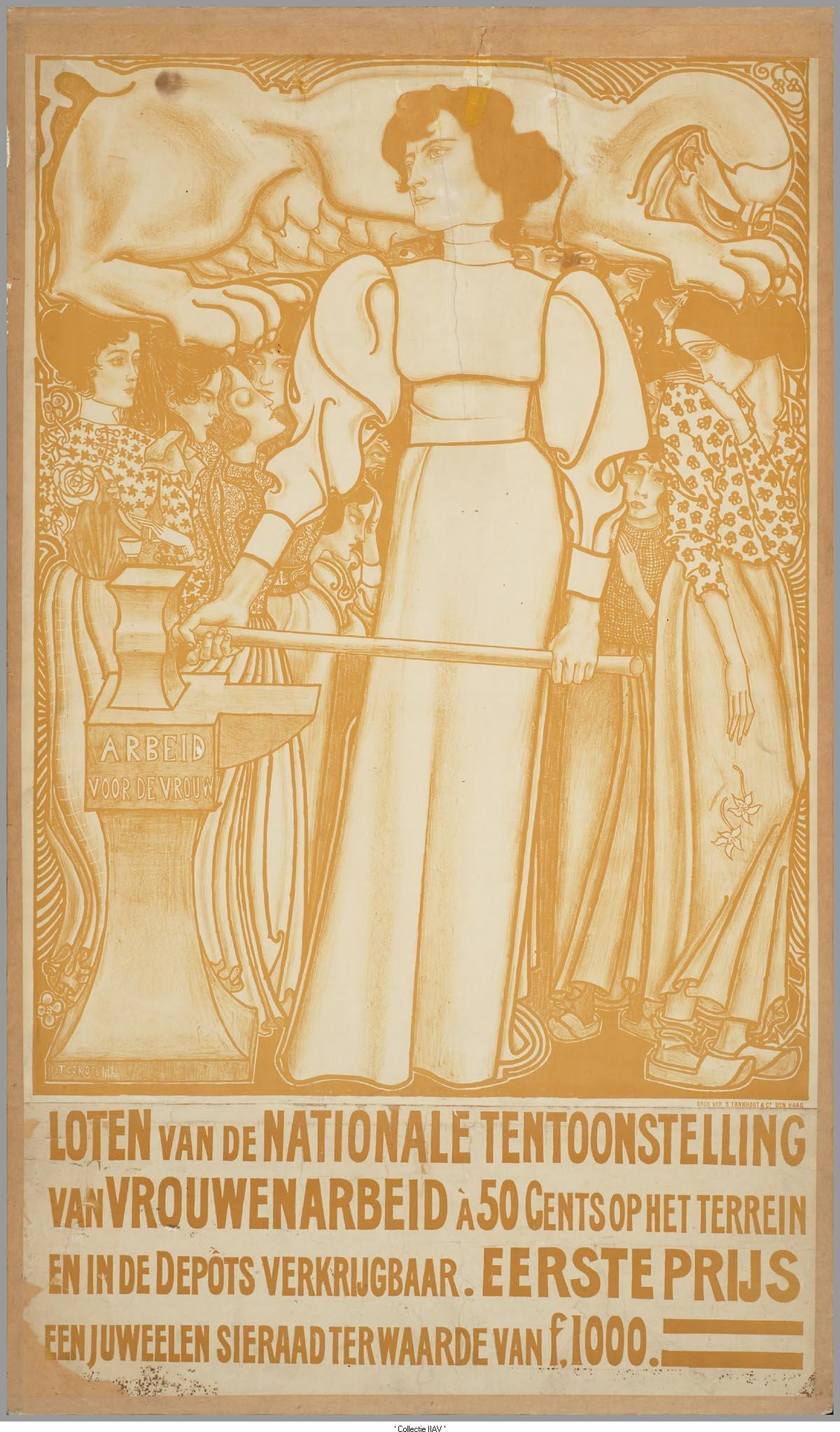 Nationale Tentoonstelling Vrouwenarbeid Den Haag 1898. Ontwerp Jan Toorop. Collectie Aletta Amsterdam